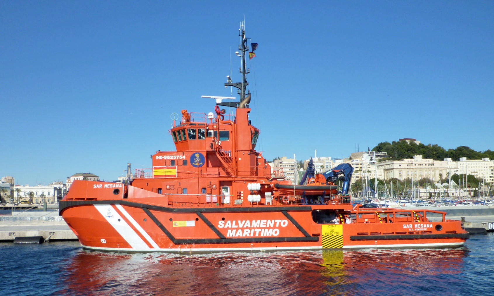 SAR Mesana en el puerto de Cartagena (España)